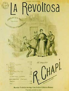 Бунтарка (афиша)